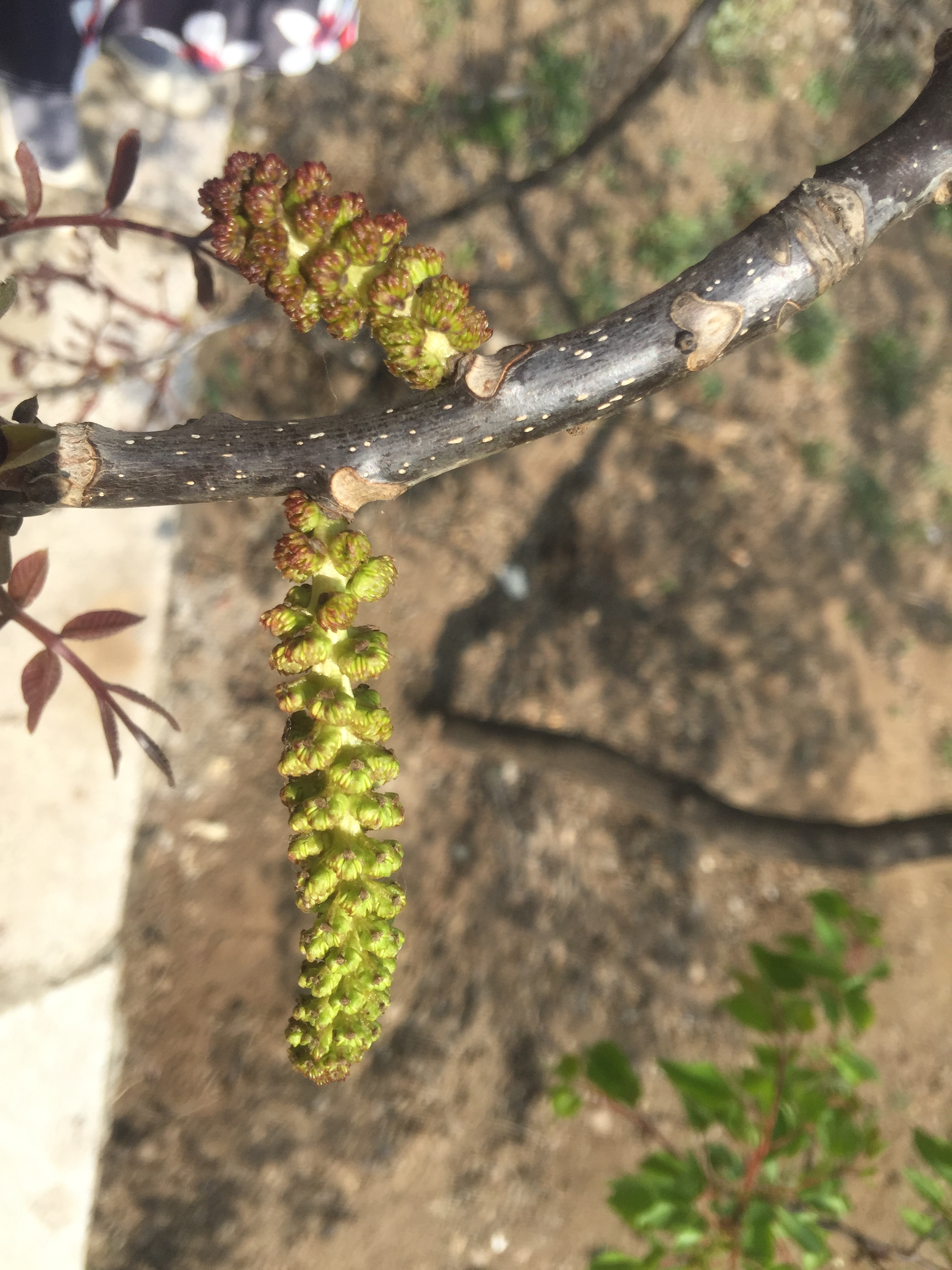 中文（中国大陆）: 紫京彩叶核桃树雄花